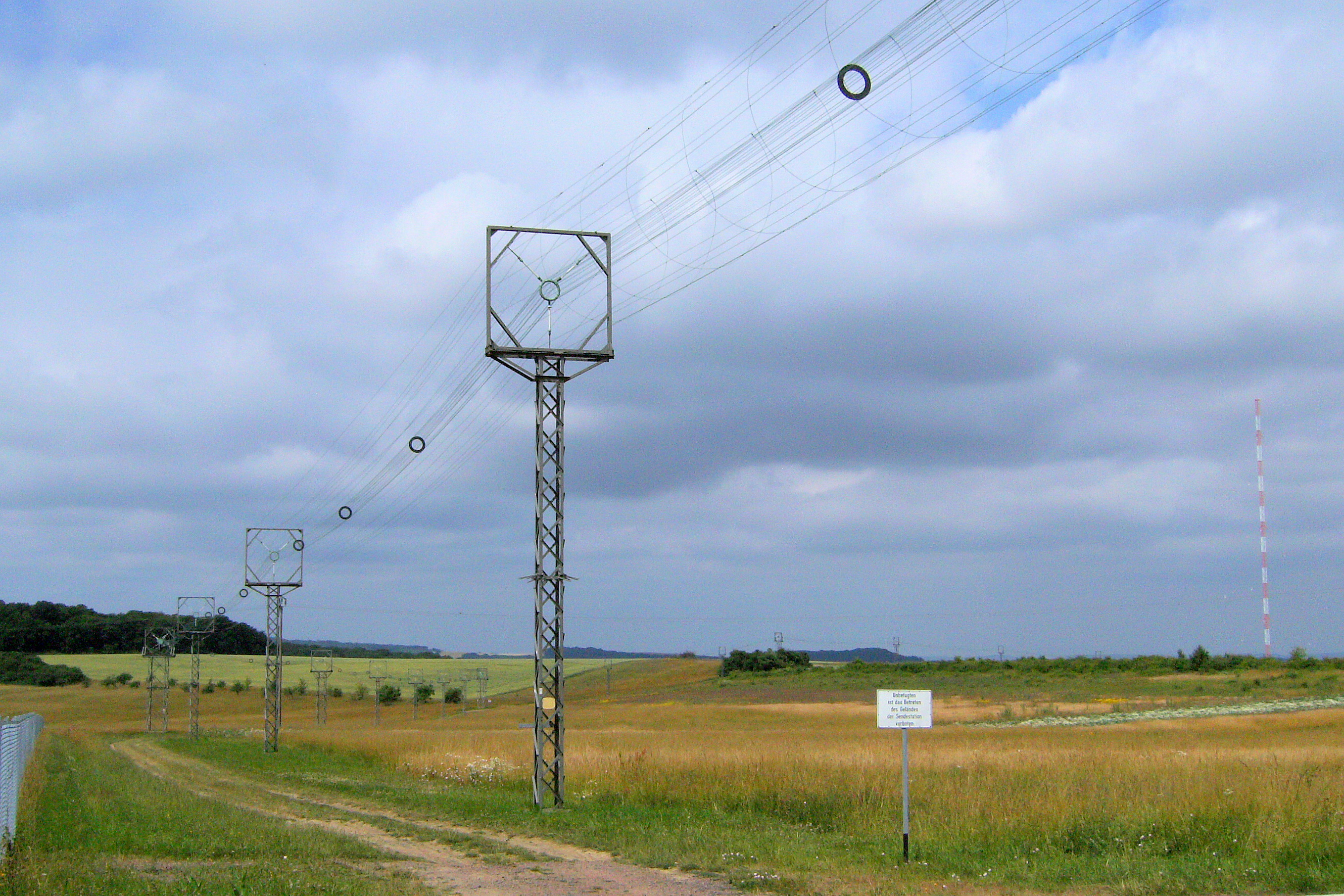 Photo 7. Parcours des feeders vers les antennes de réserve.